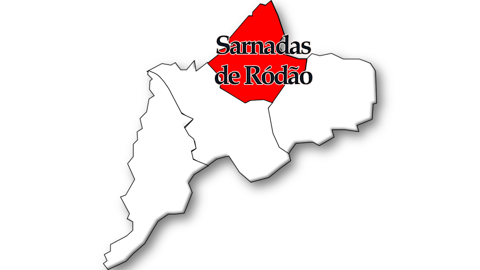 População